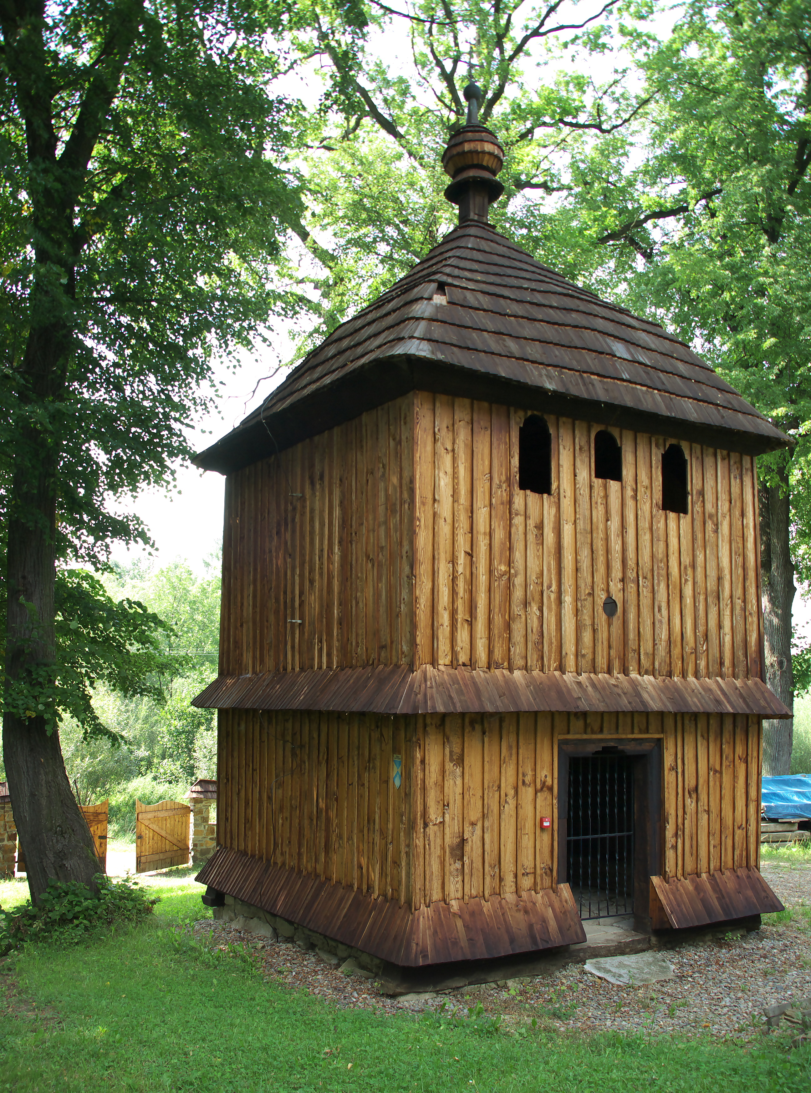 Dzwonnica przy cerkwi Przemienienia Pańskiego w Czerteżu (A-159 z 08.05.1968)